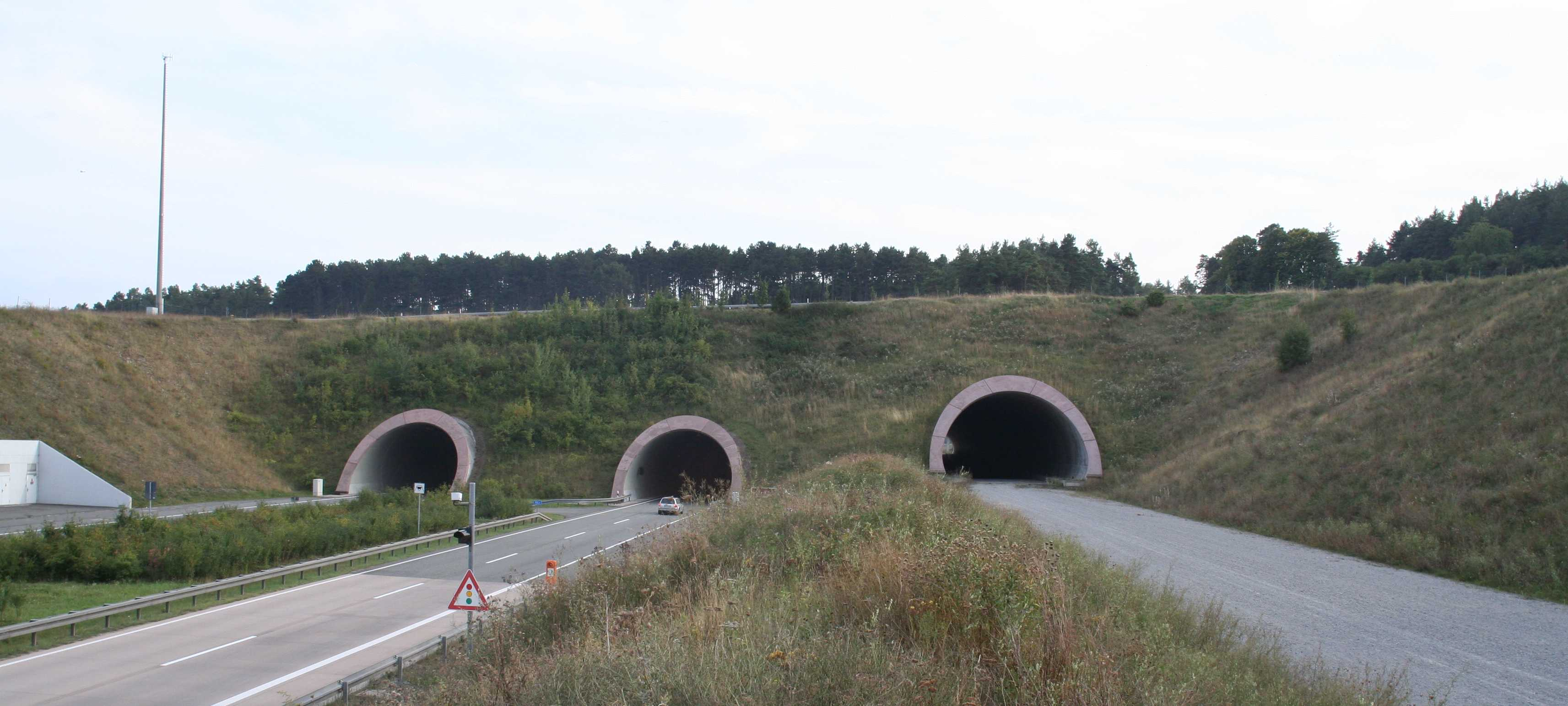 Tunnel Behringen, nördliches Portal; Bundesautobahn 71 zwischen Ilmenau und Arnstadt in Thüringen